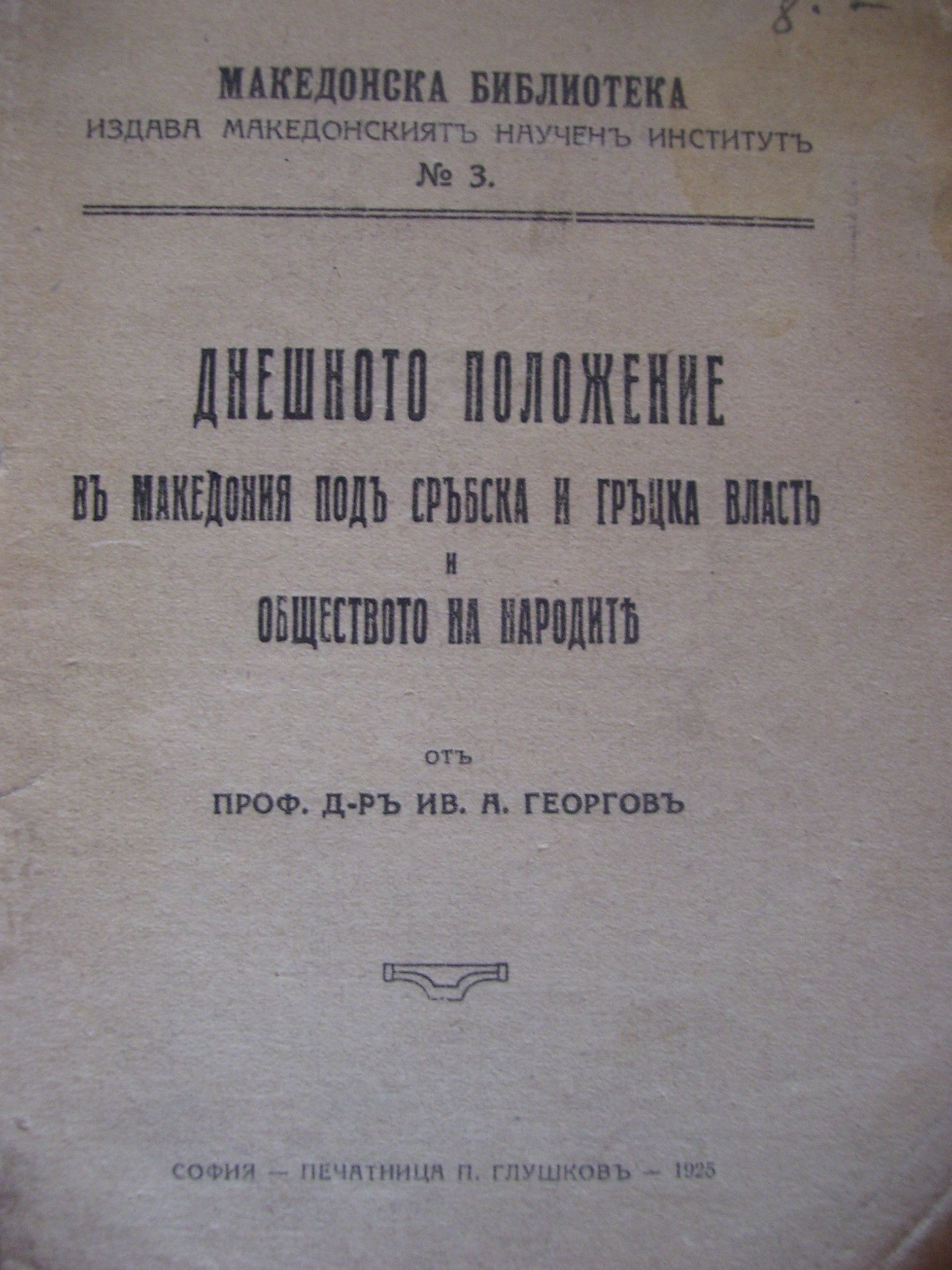 Корица на „Днешното положение в Македония под сръбска и гръцка власт и Обществото на народите“.